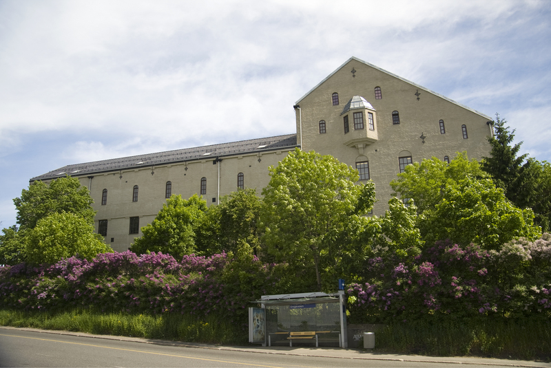 Tøyen Kulturhus